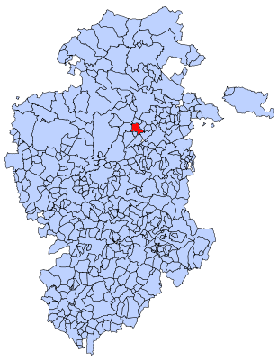 Rojas en Burgos